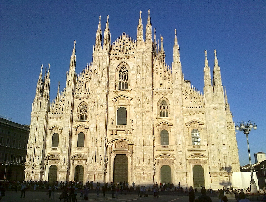 Facciata del Duomo di Milano al tramonto